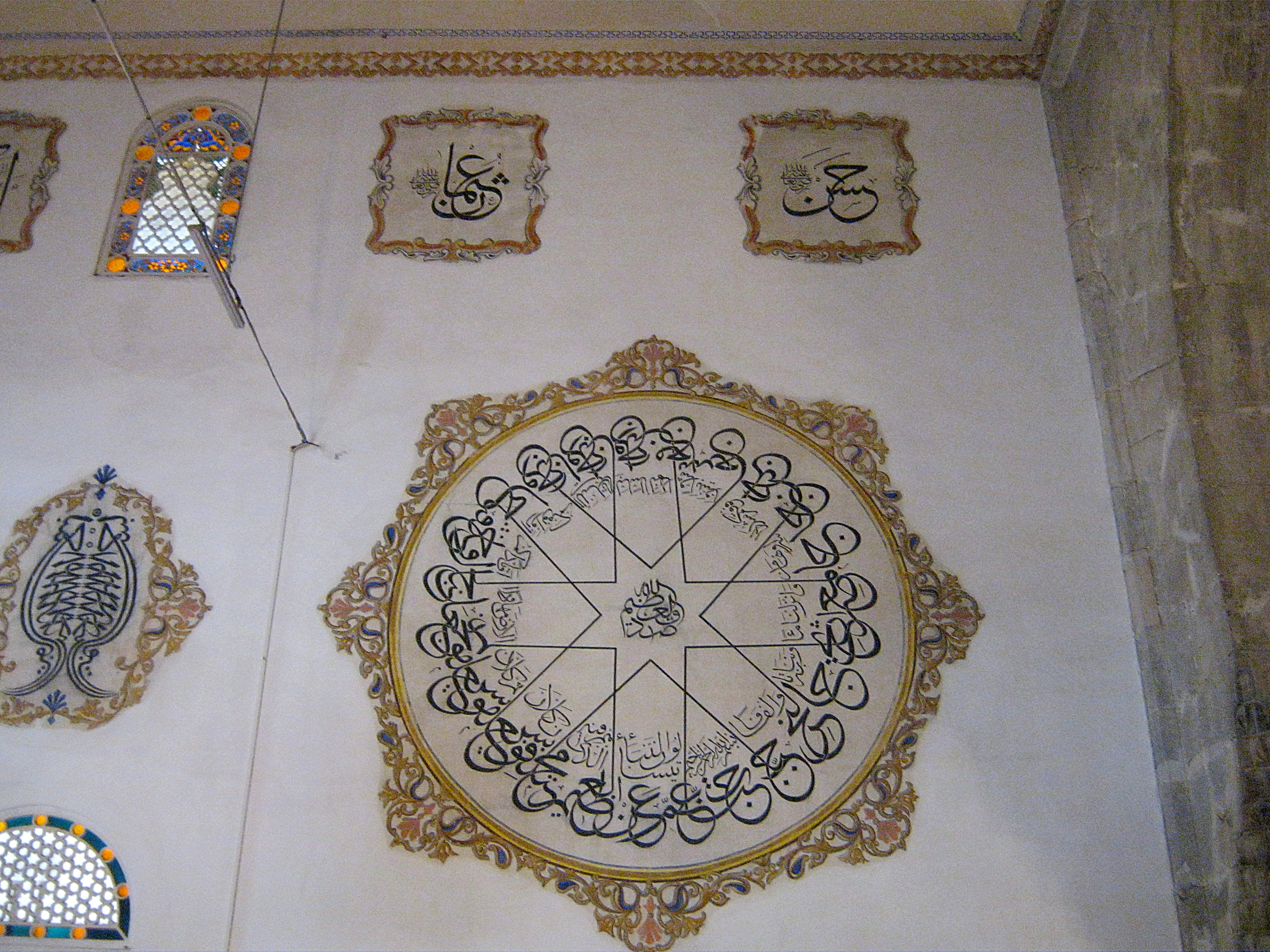 Yıldırım Bayezid Camii Bursa